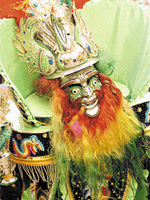 MORENO